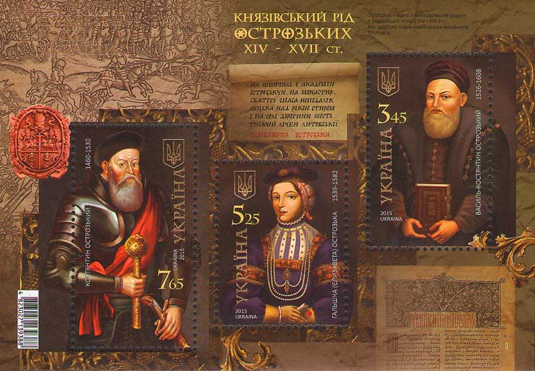 Блок «Князівський рід Острозьких XIV – XVII ст.» з трьох марок